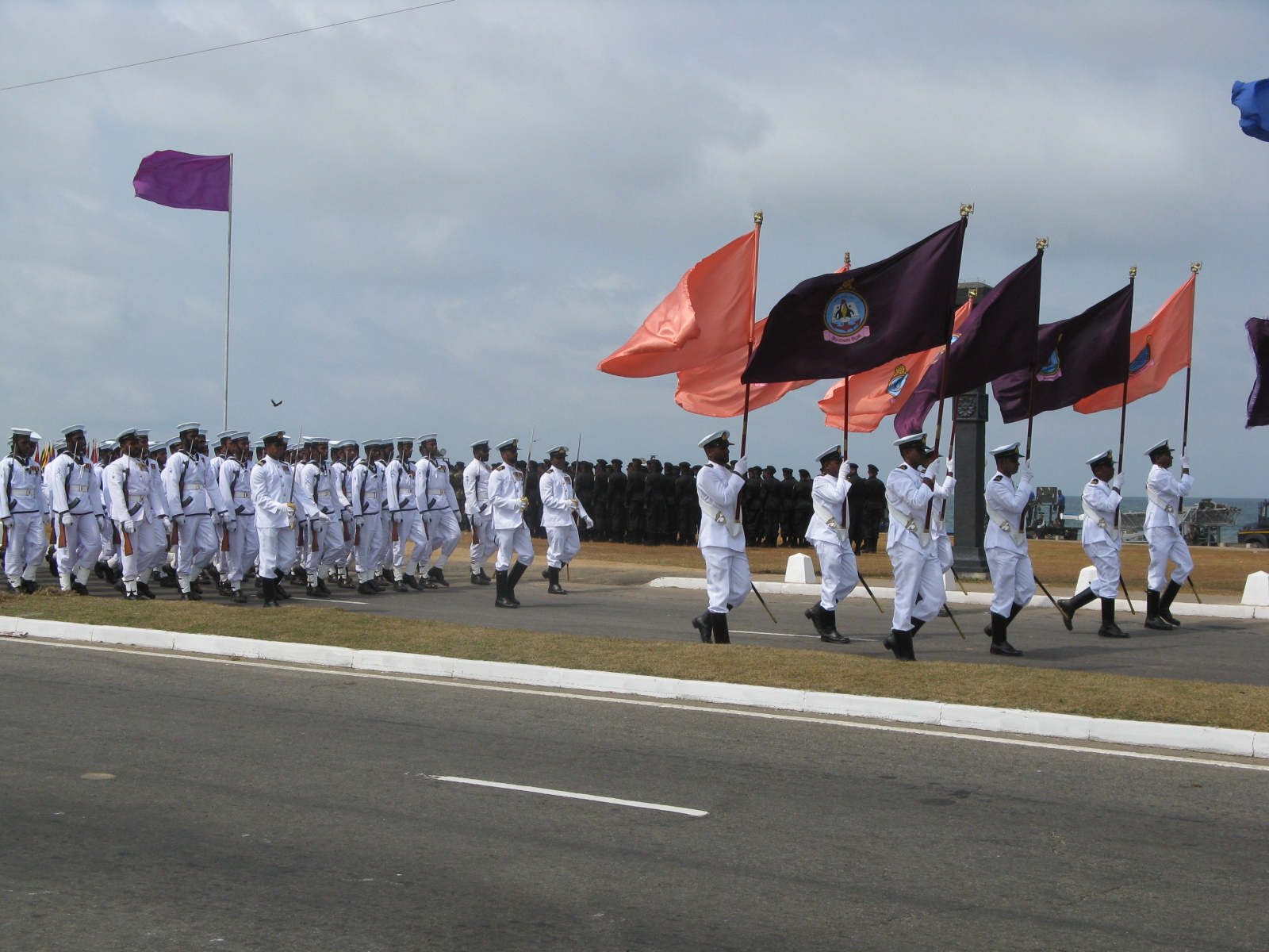 Sri Lanka Navy